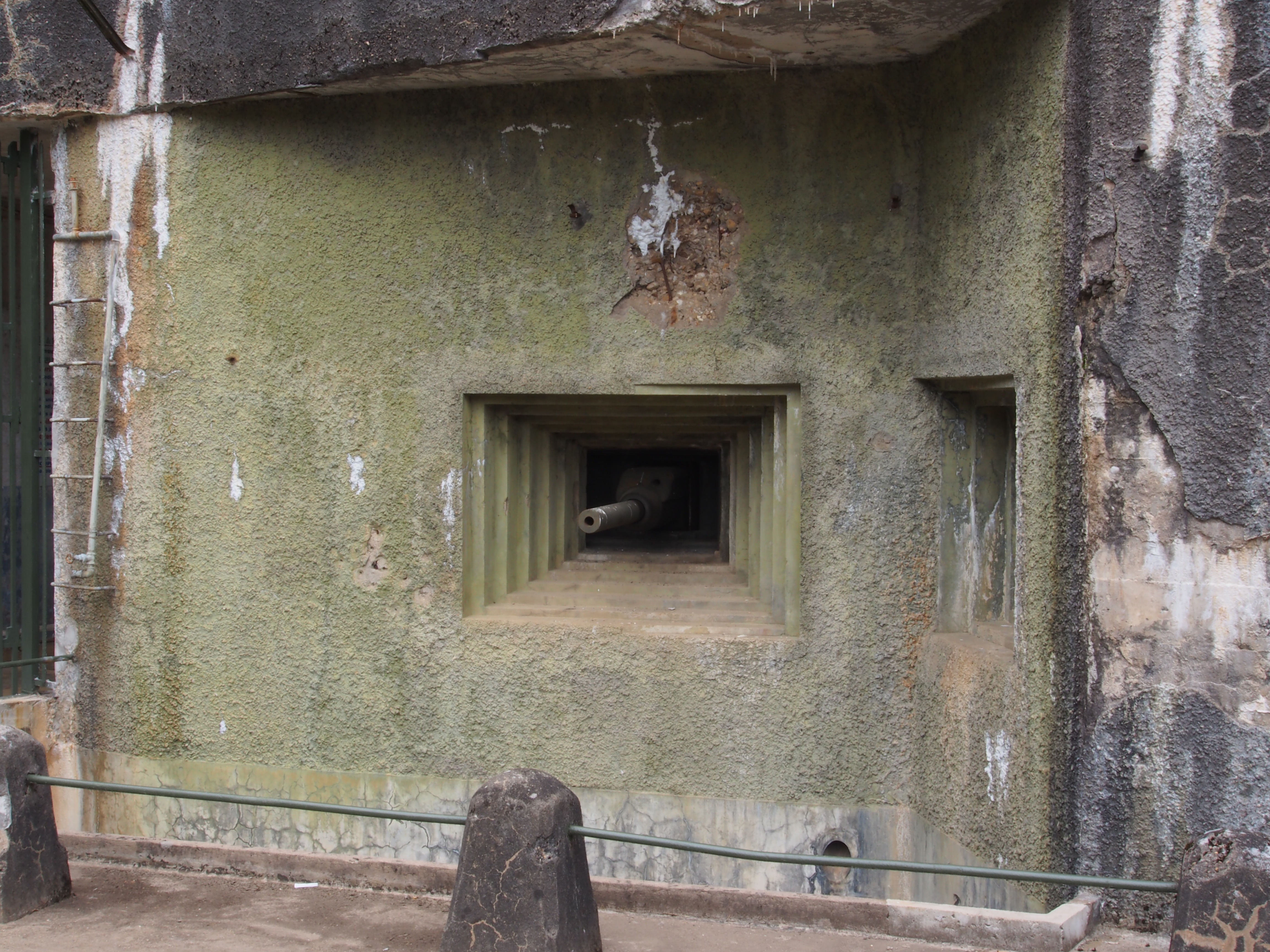 Fort de Fermont and its museum - Ouvrage Fermont - Cannon in Kazemat.